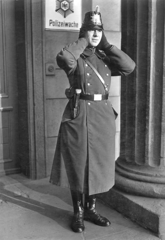 Scherl: Kälte in Berlin - am Brandenburger Tor, Januar 1937 743-37